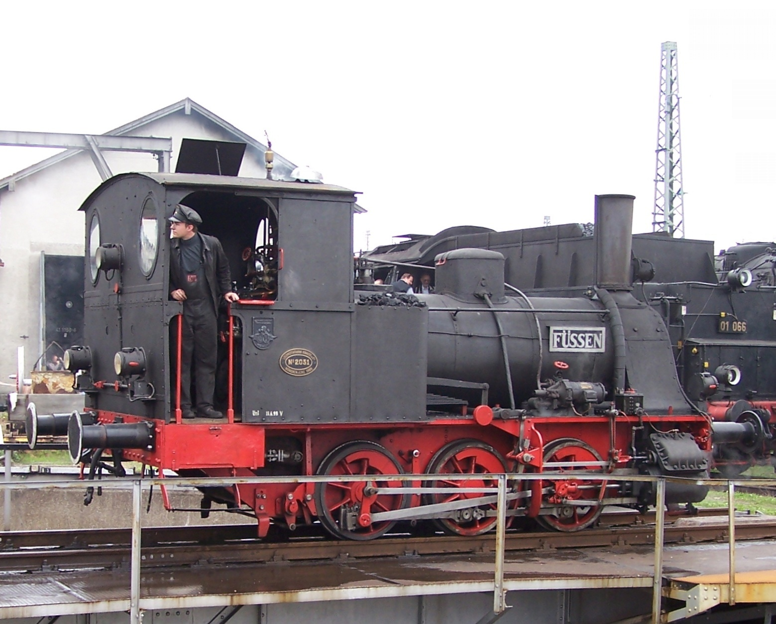 Lokomotive FÜSSEN in Nördlingen unter Dampf